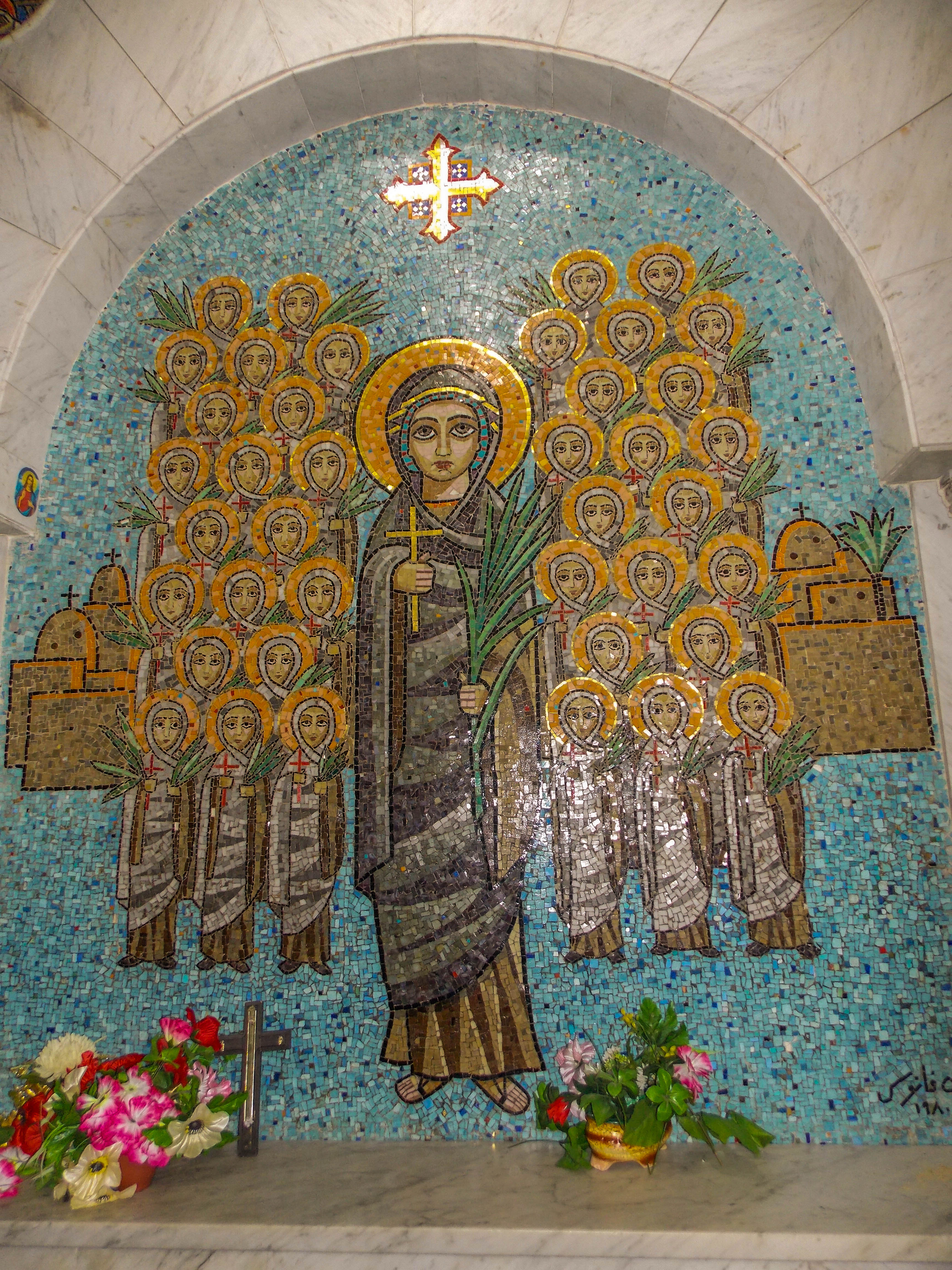 جداريه بدير القديسه دميانه